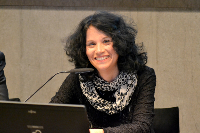 Heike Gfrereis bei einer Podiumsdiskussion im Literaturmuseum der Moderne